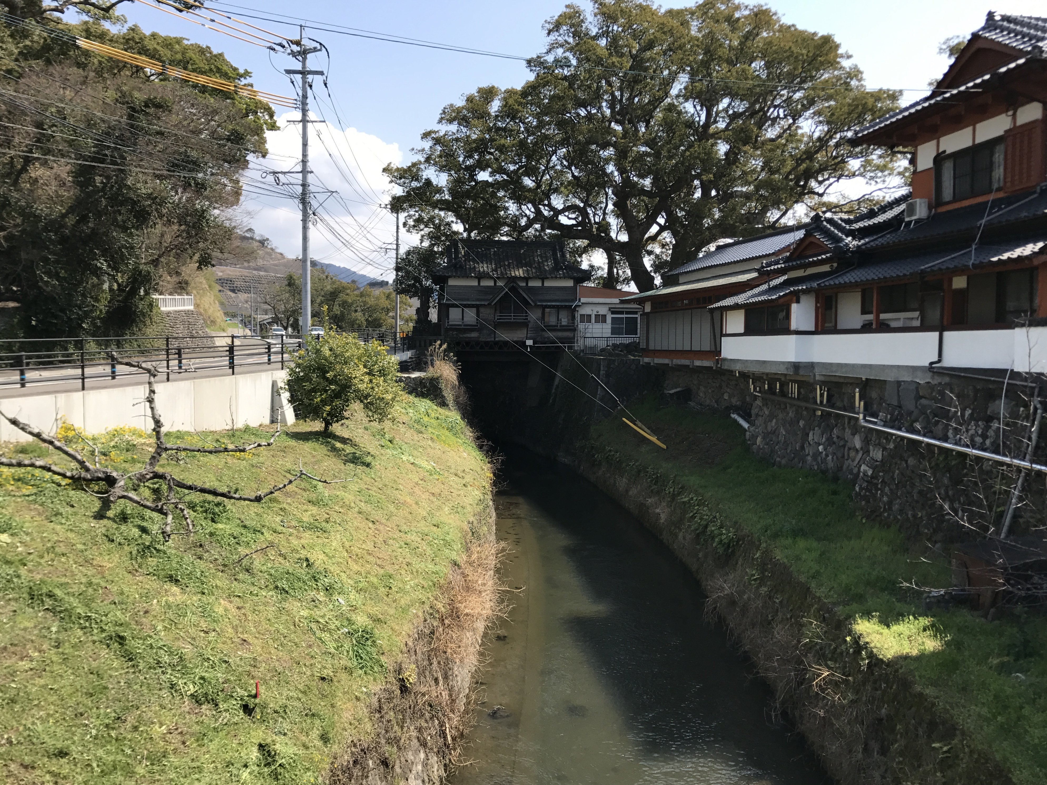 堀川用水取水口の遠景